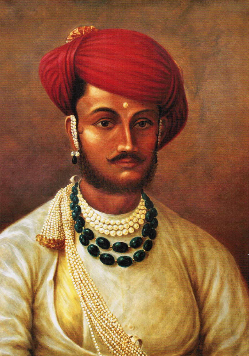 Hari Rao Holkar, Maharaja of Indore